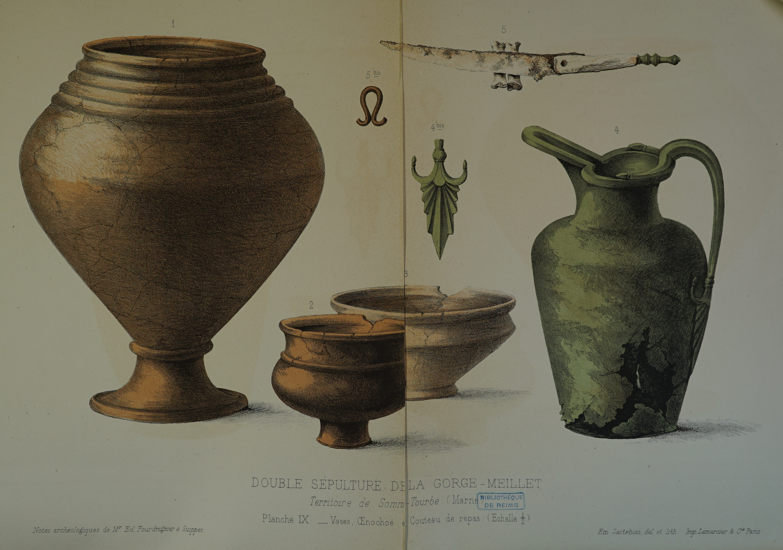 isuu des fouilles de Fourdrignier en 1875-76.